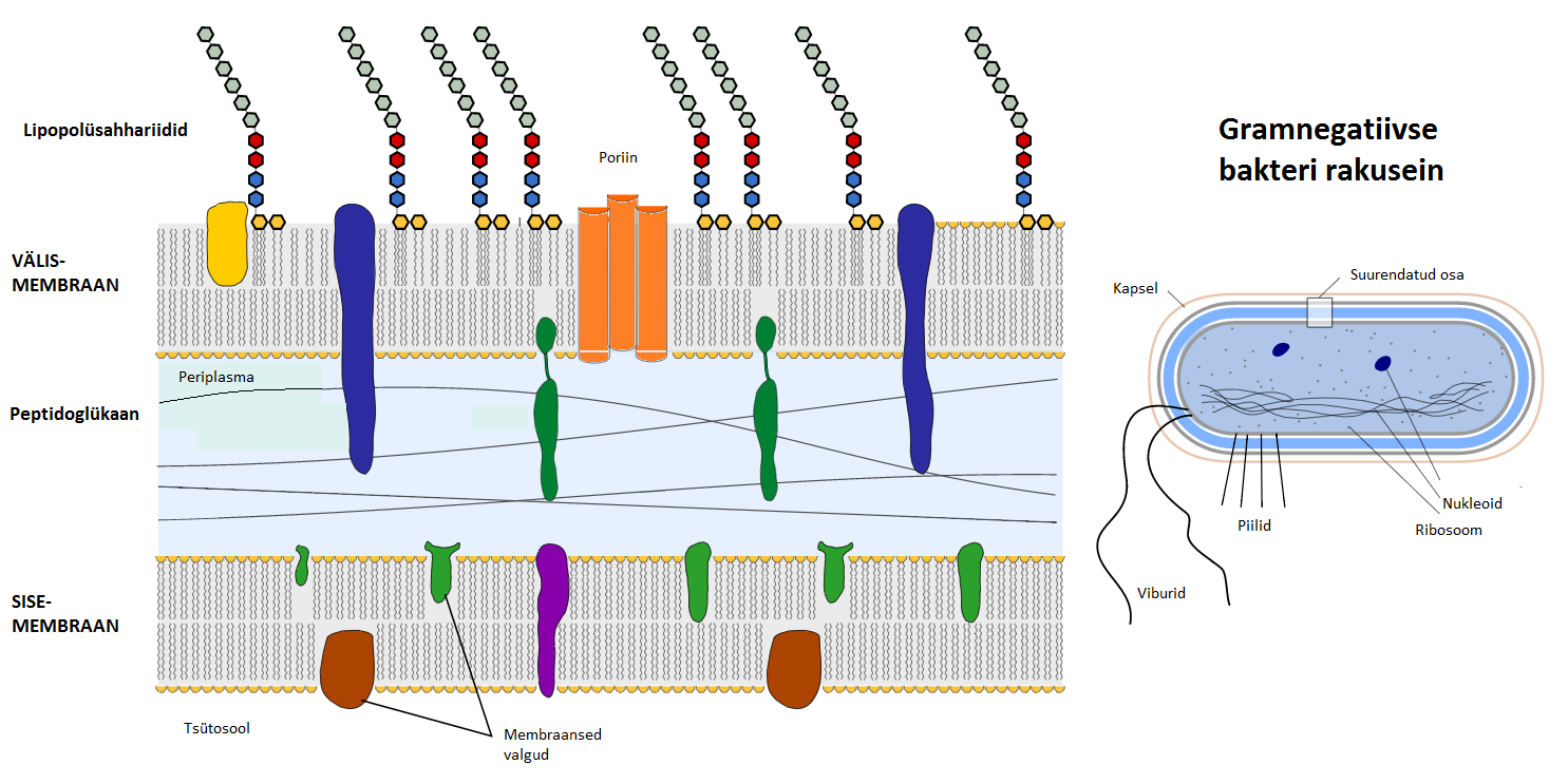 Gramnegatiivse bakeri rakusein ja selle koostisosad